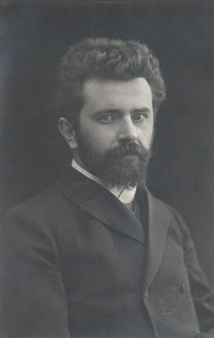 Konrad Grass, baltisaksa teoloog